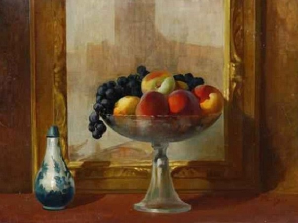 Natura morta con cesto di frutta, olio su tela, 59 x 70 cm.